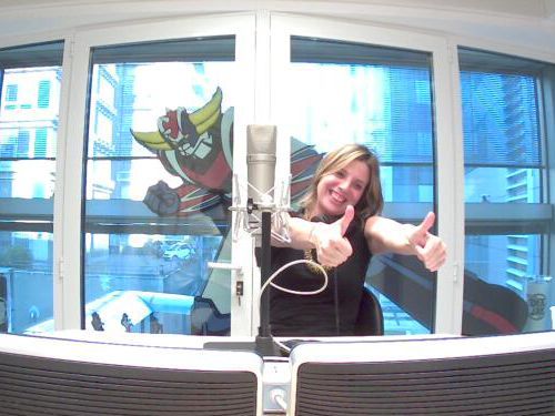 Sarah Jane Ranieri